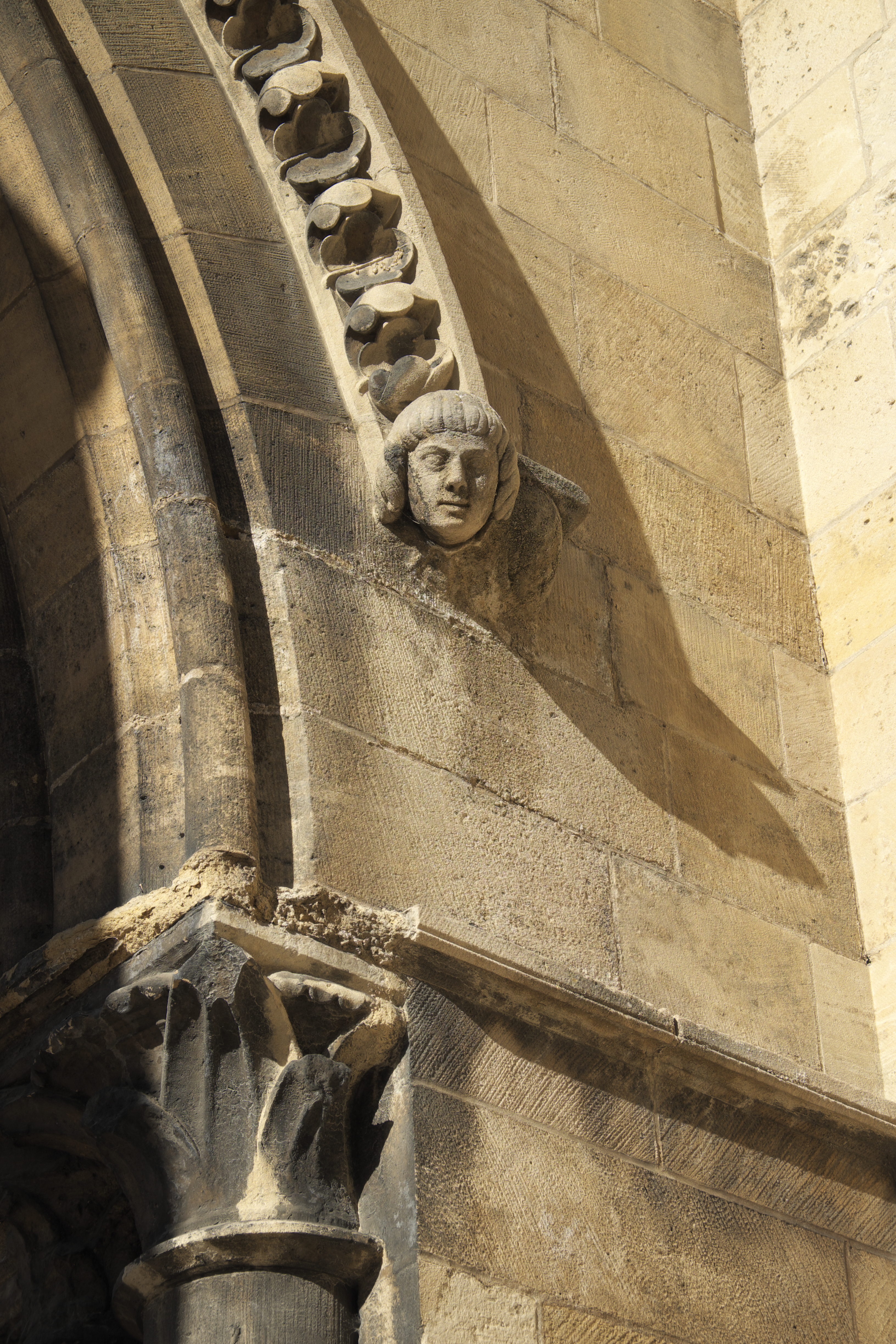 Katholische Pfarrkirche Notre-Dame in Bougival im Département Yvelines (Île-de-France/Frankreich), Konsole in Form eines Kopfes am Portal